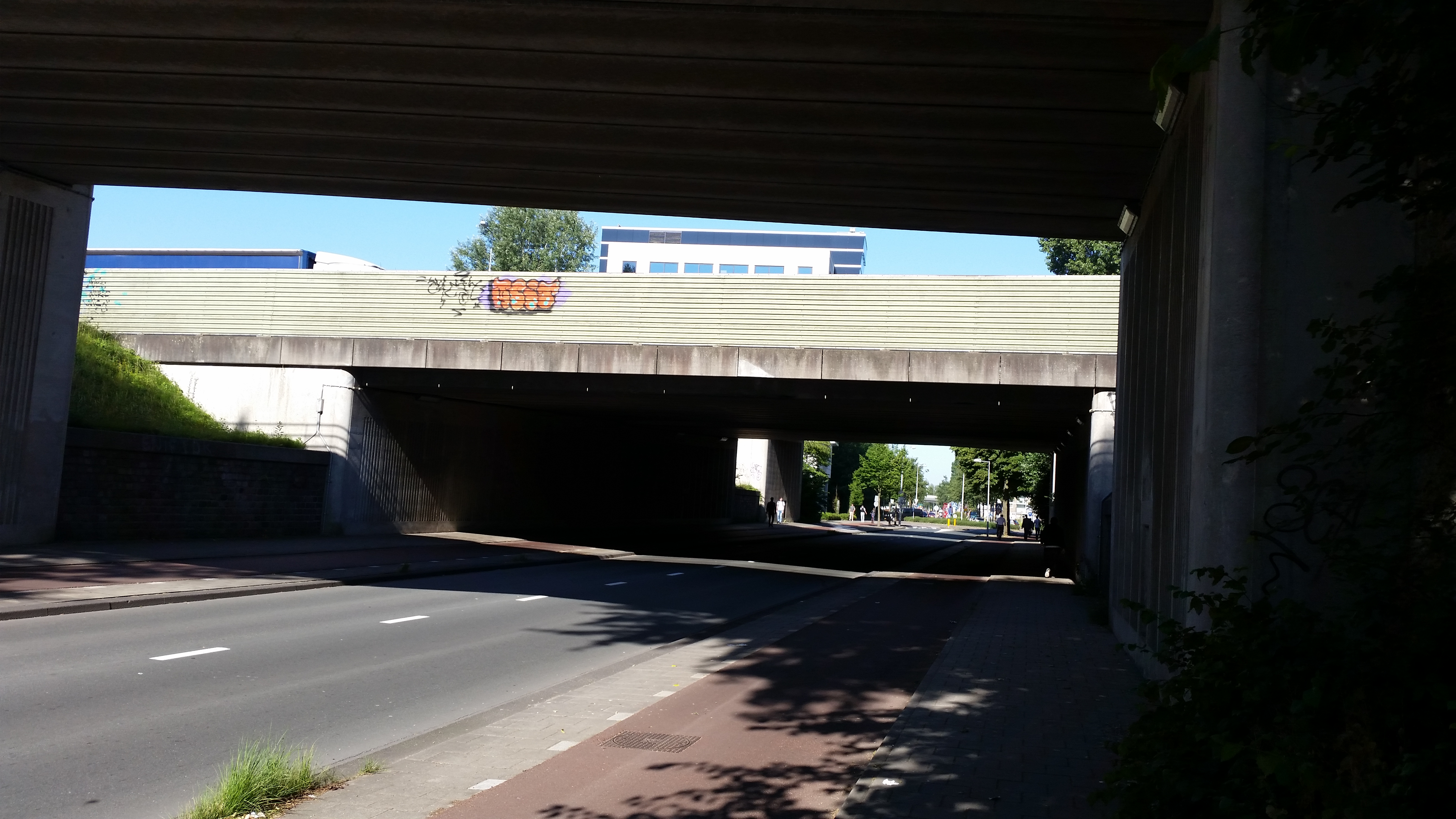 Vlaardingenlaanbrug